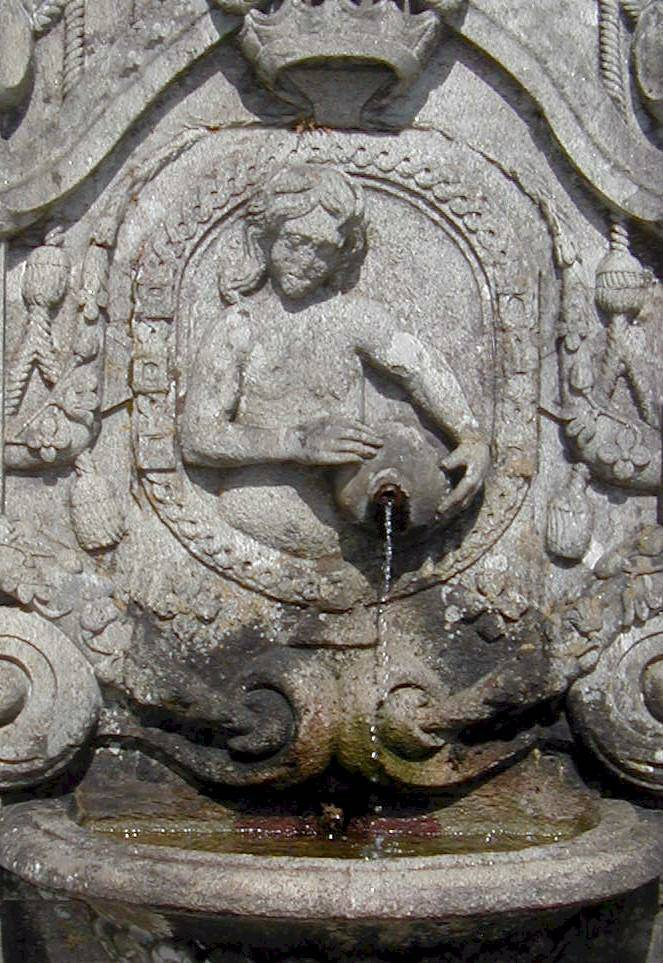 Fonte do tacto nos escadórios do Bom Jesus em Braga. Foto de Jose Goncalves